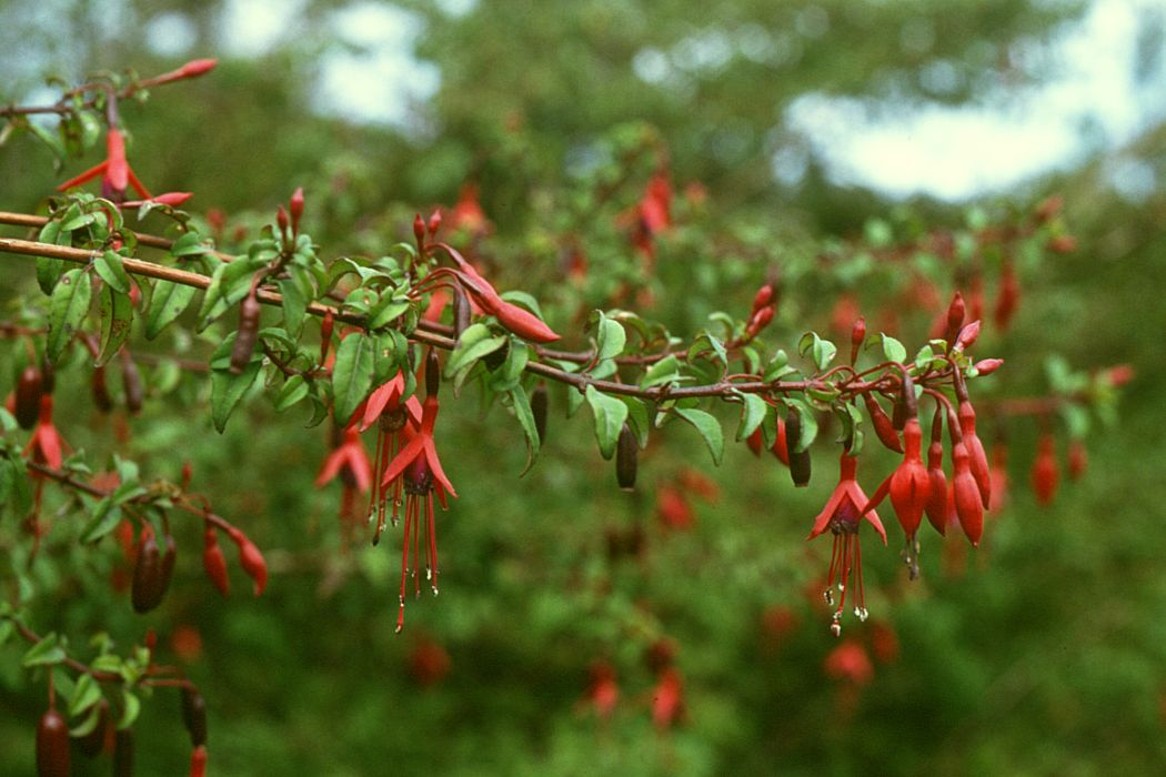 Fuchsia magellanica, Nachtkerzengewächse (Onagraceae) - Chile, ca. 15 km NE Pargua (Prov. de Llanquihue)